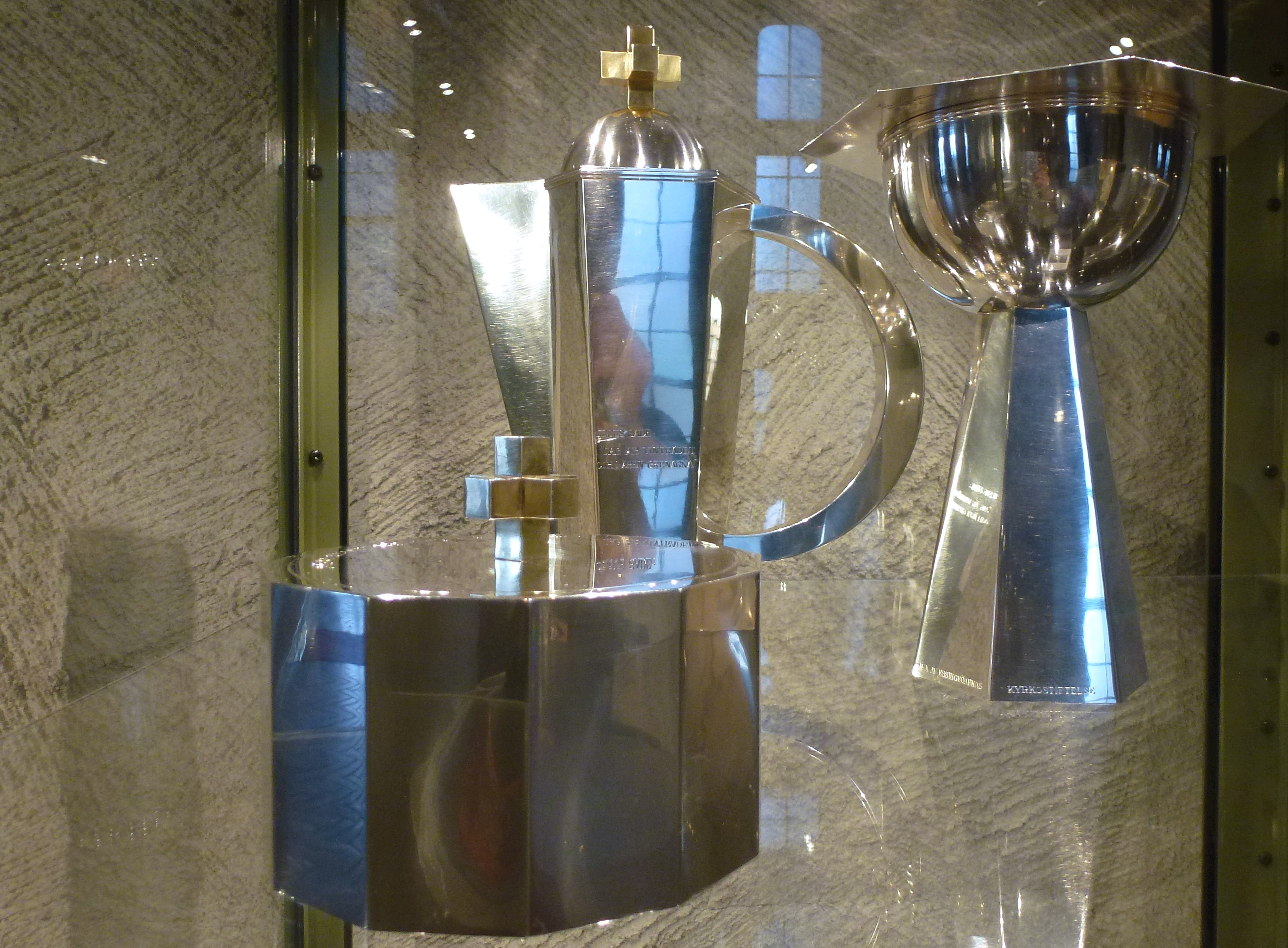 Essinge kyrka, kyrksilvret formgivet av Wiwen Nilsson